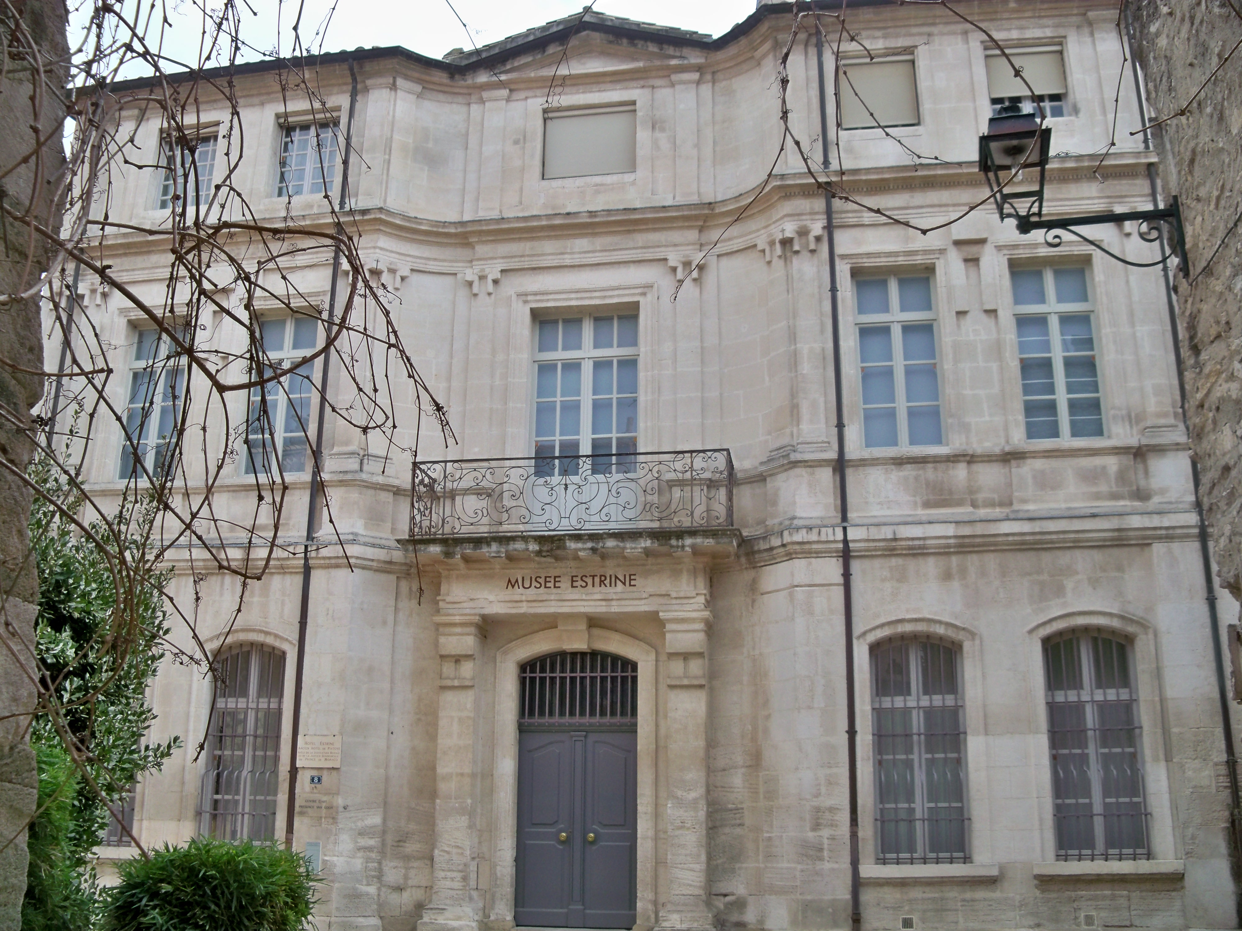 Hotel d'Estrine à Saint Rémy de Provence (13), France